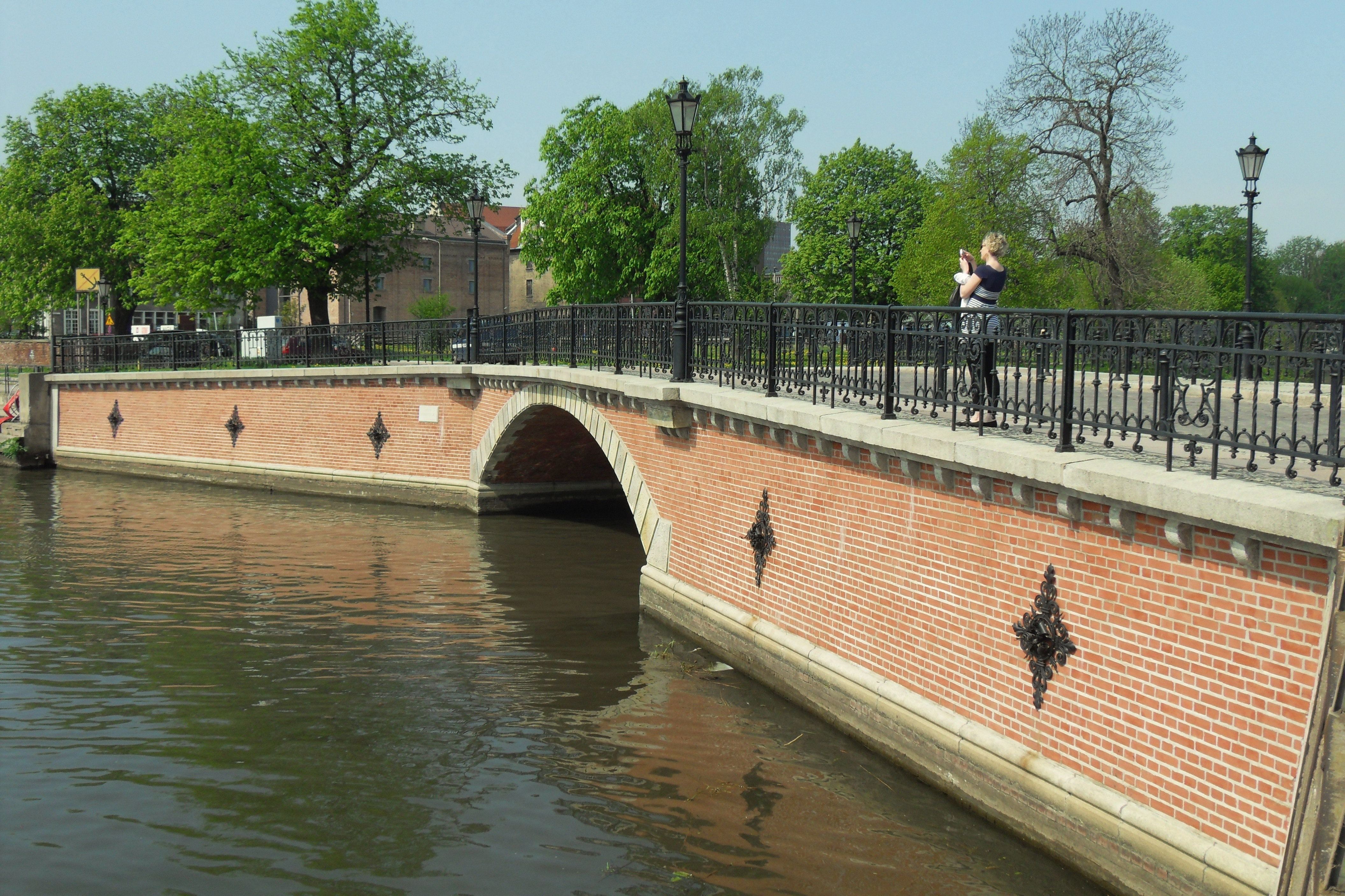 Gdańsk. Most Wapienniczy (zbudowany 1896-1897) w ciągu ul. Wapienniczej.